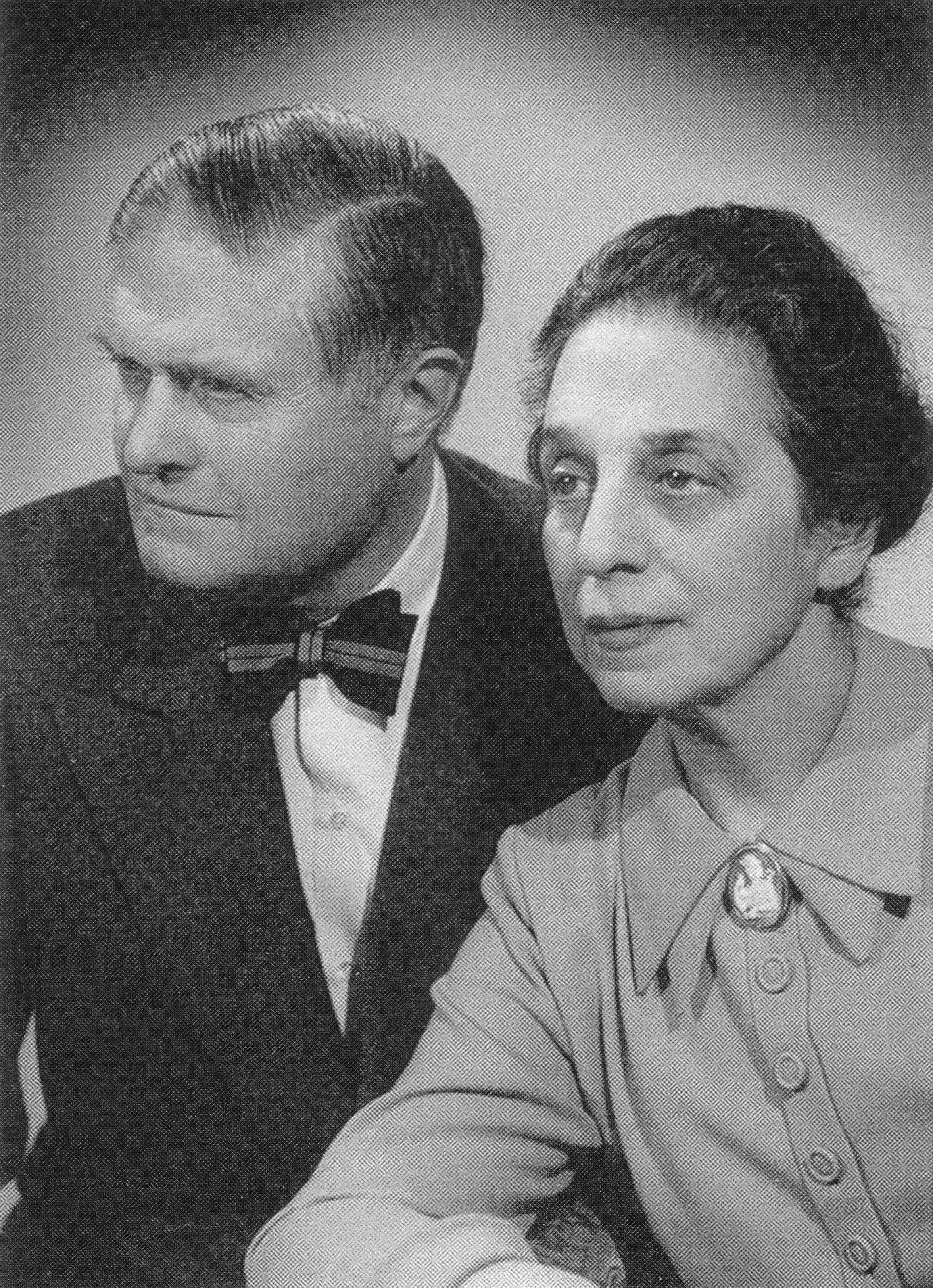 Tor Berg & Greta Berg cirka 1950